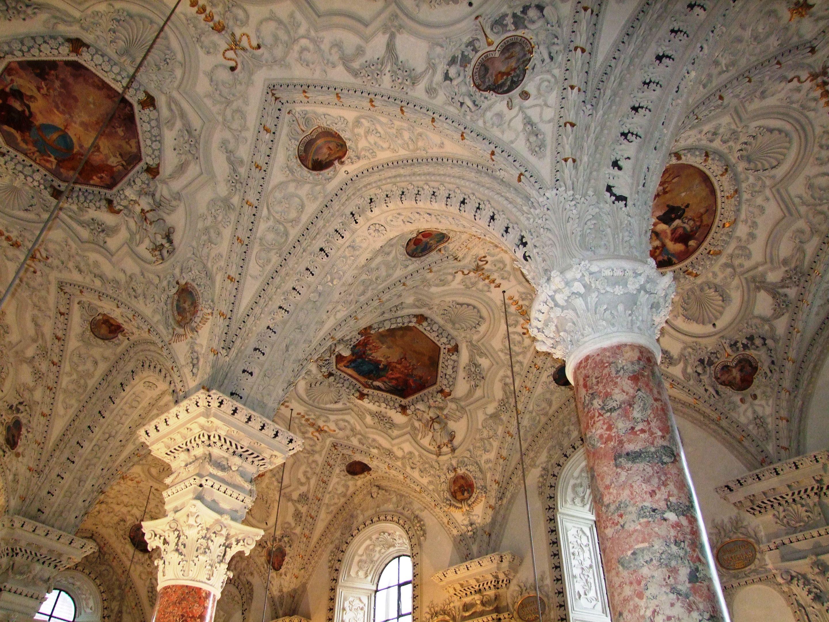 Die Kreuzherrenkirche mit Wessobrunner Stuck und Fresken von Johann Friedrich Sichelbein.